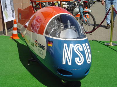 Wilhelm Herz NSU Delphin 3 Nachbau; Weltrekordmotorrad 1956-2006 50 Jahre schneller als 200mph